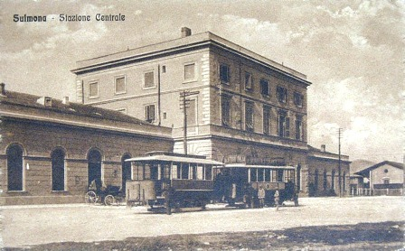 Sulmona - Piazza stazione